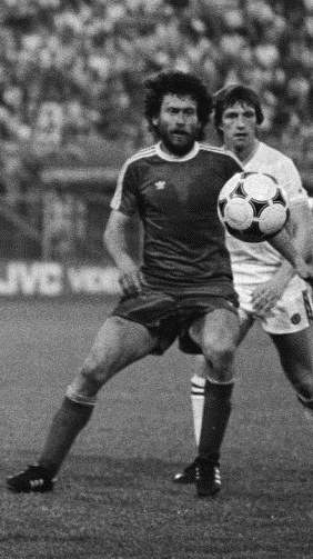 Breitner (cropped).